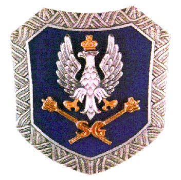 Logo Sztabu Generalnego Wojska Polskiego